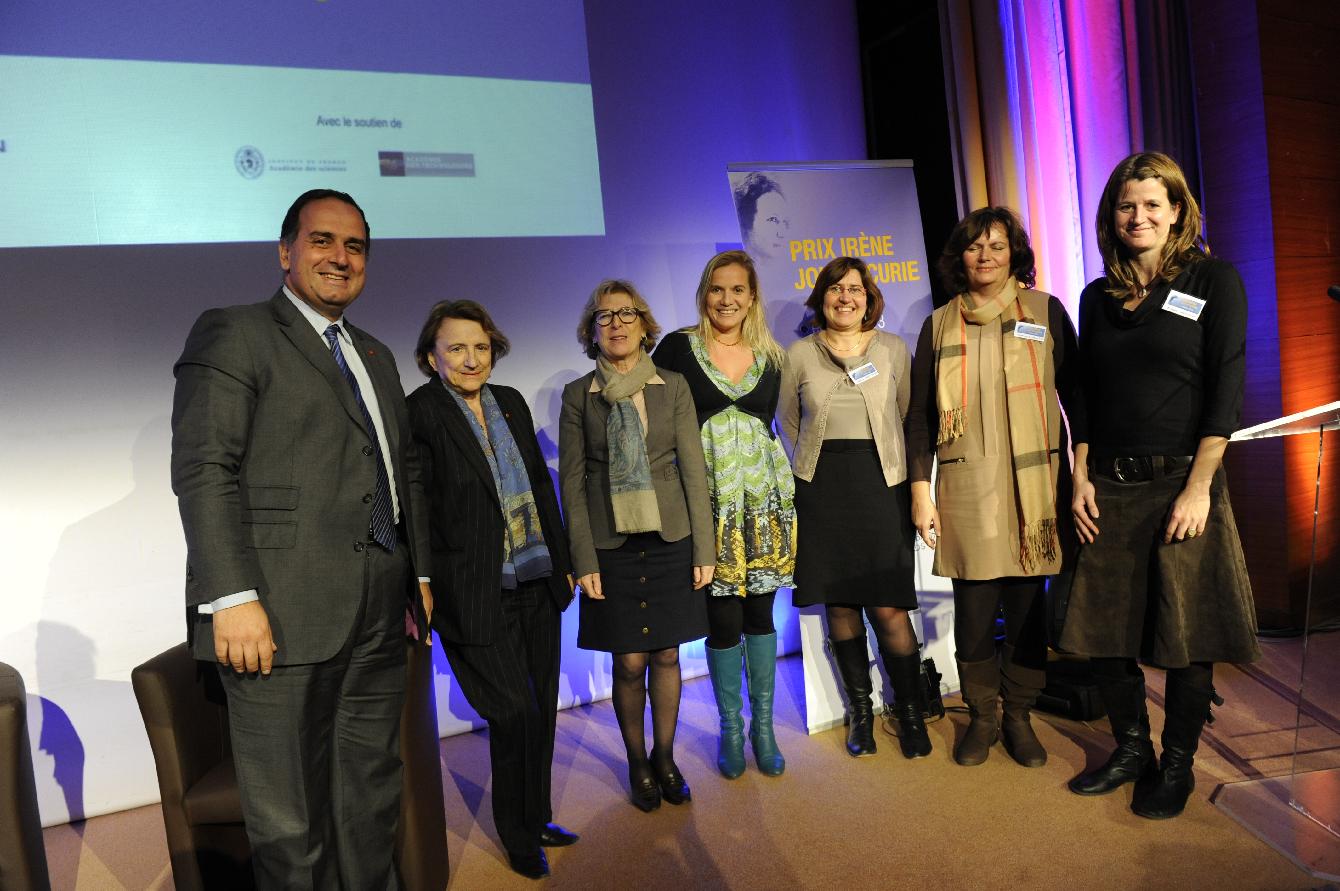 Le Prix Irène Joliot-Curie, remis par Geneviève Fioraso, ministre de l’Enseignement supérieur et de la Recherche et Marwan Lahoud, Directeur Général délégué à la Stratégie et à l'International du Groupe EADS, a pour vocation de mettre en lumière les carrières exemplaires de femmes de sciences. - Valérie Masson-Delmotte, Prix de la "Femme scientifique de l'année" - Wiebke Drenckhan, Prix de la "Jeune Femme scientifique" - Claire Wyart, Prix de la "Jeune Femme scientifique" - Véronique Newland, Prix du "Parcours Femme entreprise"